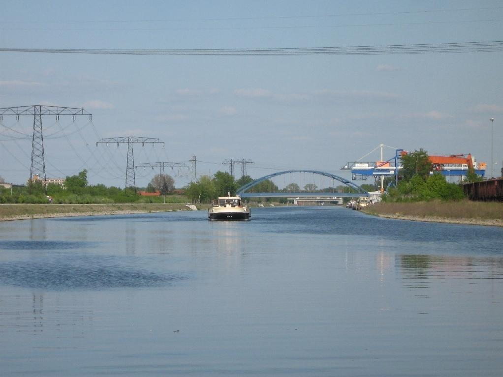 der Silokanal in Brandenburg an der Havel (Brandenburg, Germany)